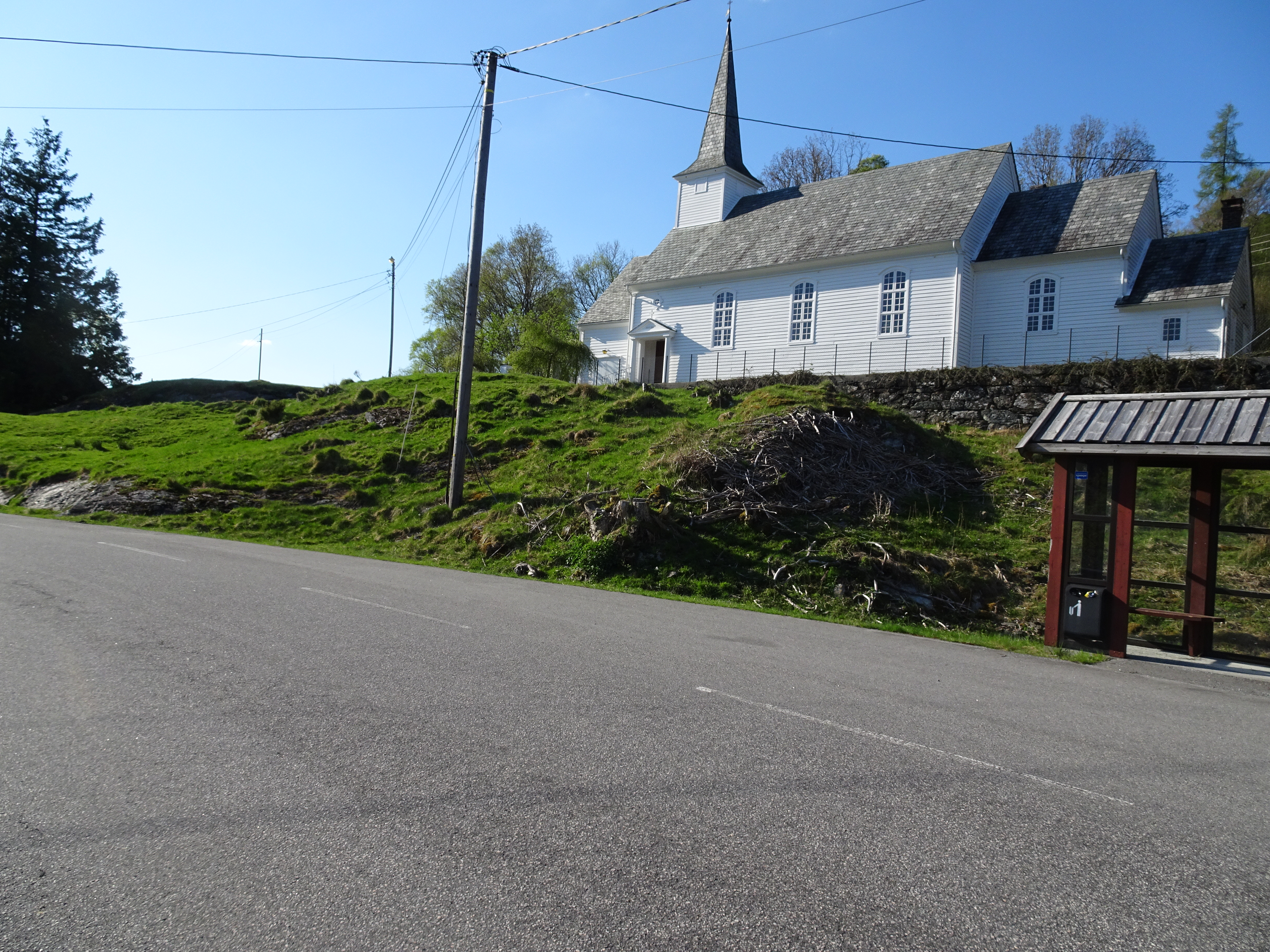 Fylkesvei 549 (tidl. 121) forbi Sundvor kirke